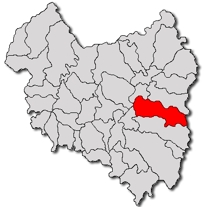 Categorie:Hărţi ale judeţului Covasna